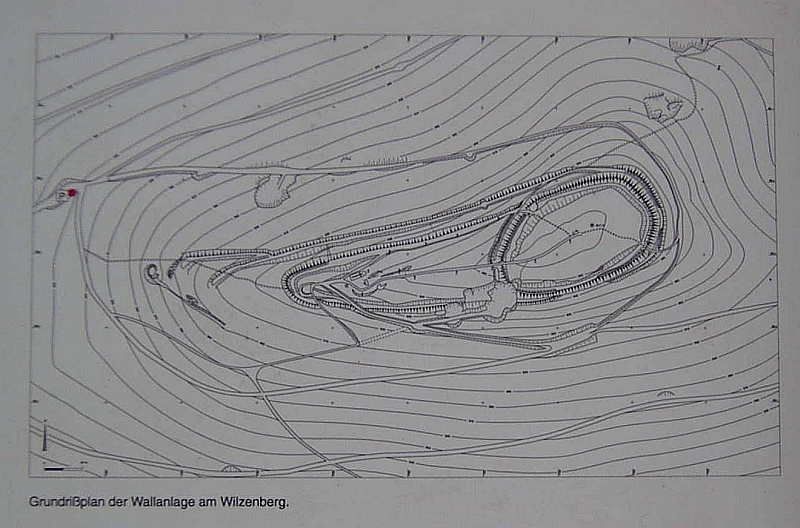 Plan der Wallanlage Wilzenberg (Schmallenberg), Germany.